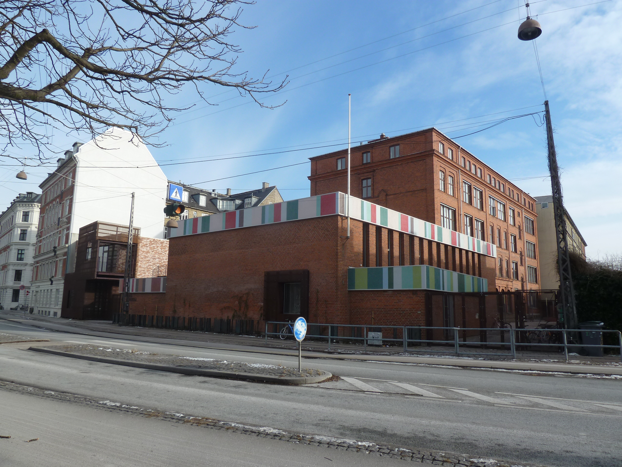 The school Bordings Friskole in Østerbro in Copenhagen.